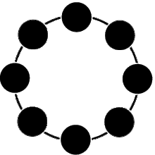 祇園東 紋章